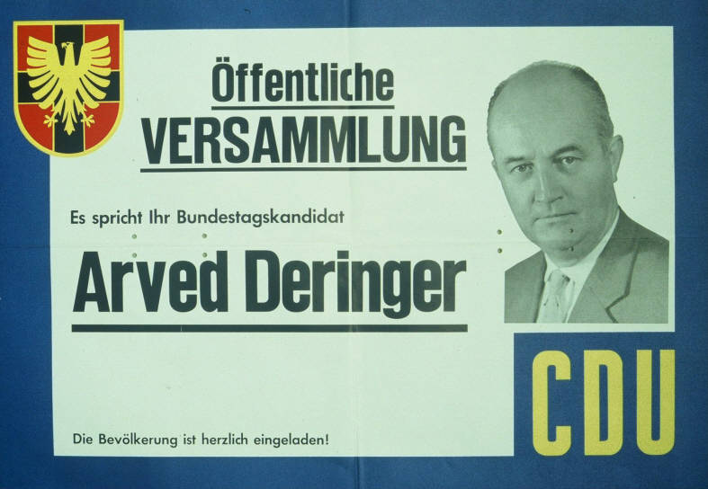 Öffentliche Versammlung Es spricht ihr Bundestagskandidat Arved Deringer ... Abbildung: Porträtfoto Plakatart: Ankündigungsplakat Objekt-Signatur: 10-001: 924 Bestand: Plakate zu Bundestagswahlen (10-001) GliederungBestand10-18: Plakate zu Bundestagswahlen (10-001) » Die 4. Bundestagswahl am 17. September 1961 » CDU » Ankündigungsplakate Lizenz: KAS/ACDP 10-001: 924 CC-BY-SA 3.0 DE